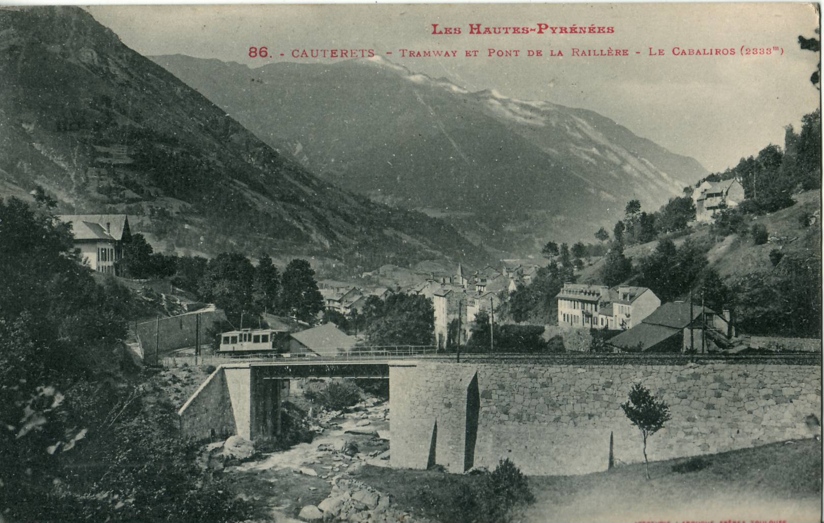 Carte postale ancienne éditée par Phototypie Labouche frères à Toulouse, collection "Les hautes Pyrénées, n°86 :CAUTERETS - Tramway et Pont de la Raillère - Le Cabaliros (2333 m).